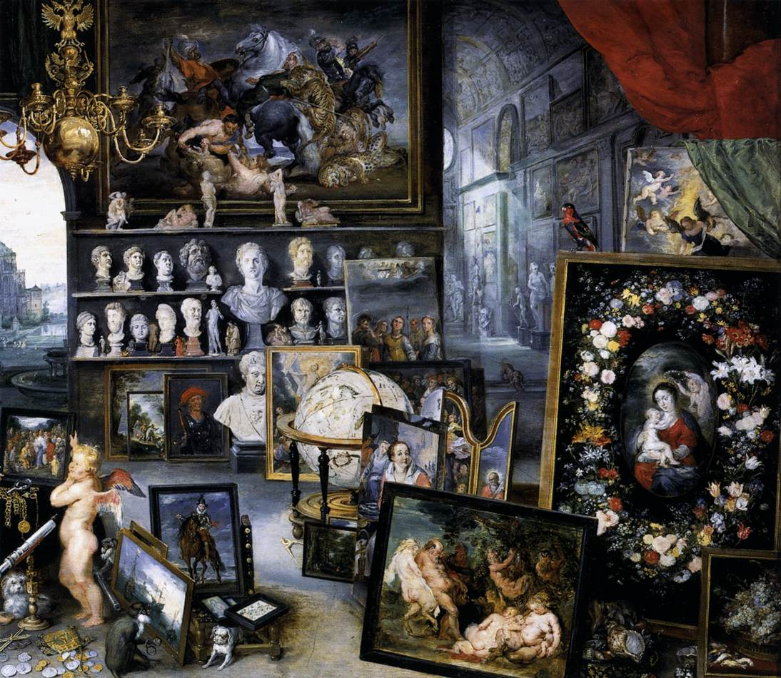 detail